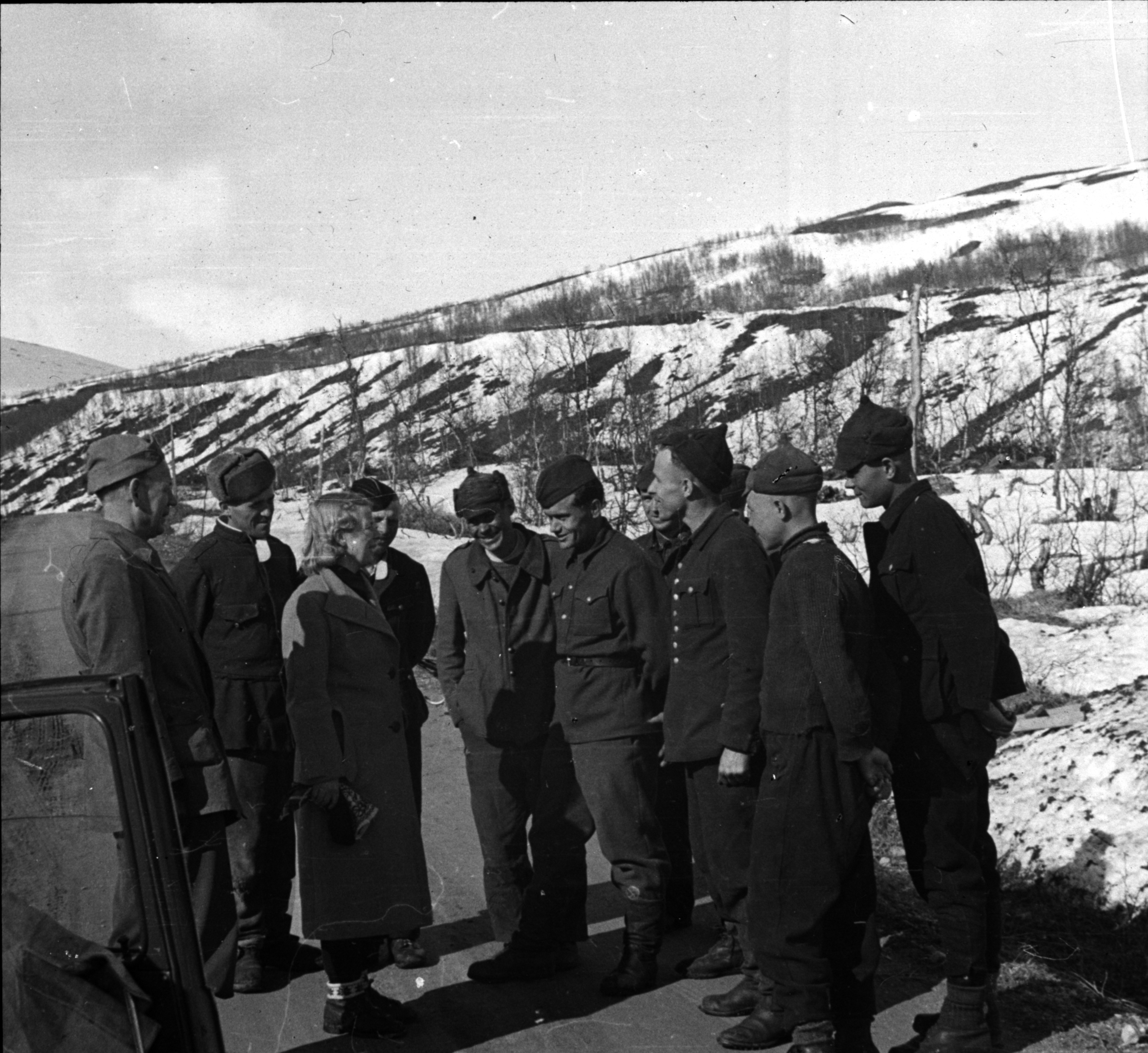 Bildet er hentet fra Arkivverket. Gruppe av menn og Gunvor Galtung Haavik. Arkivinstitusjon : Riksarkivet Arkivnavn : Kreyberg, Leiv Sted : NORGE, 00 Ukjent, 00 Ukjent, Emneord: Andre verdenskrig, Krig Avbildet